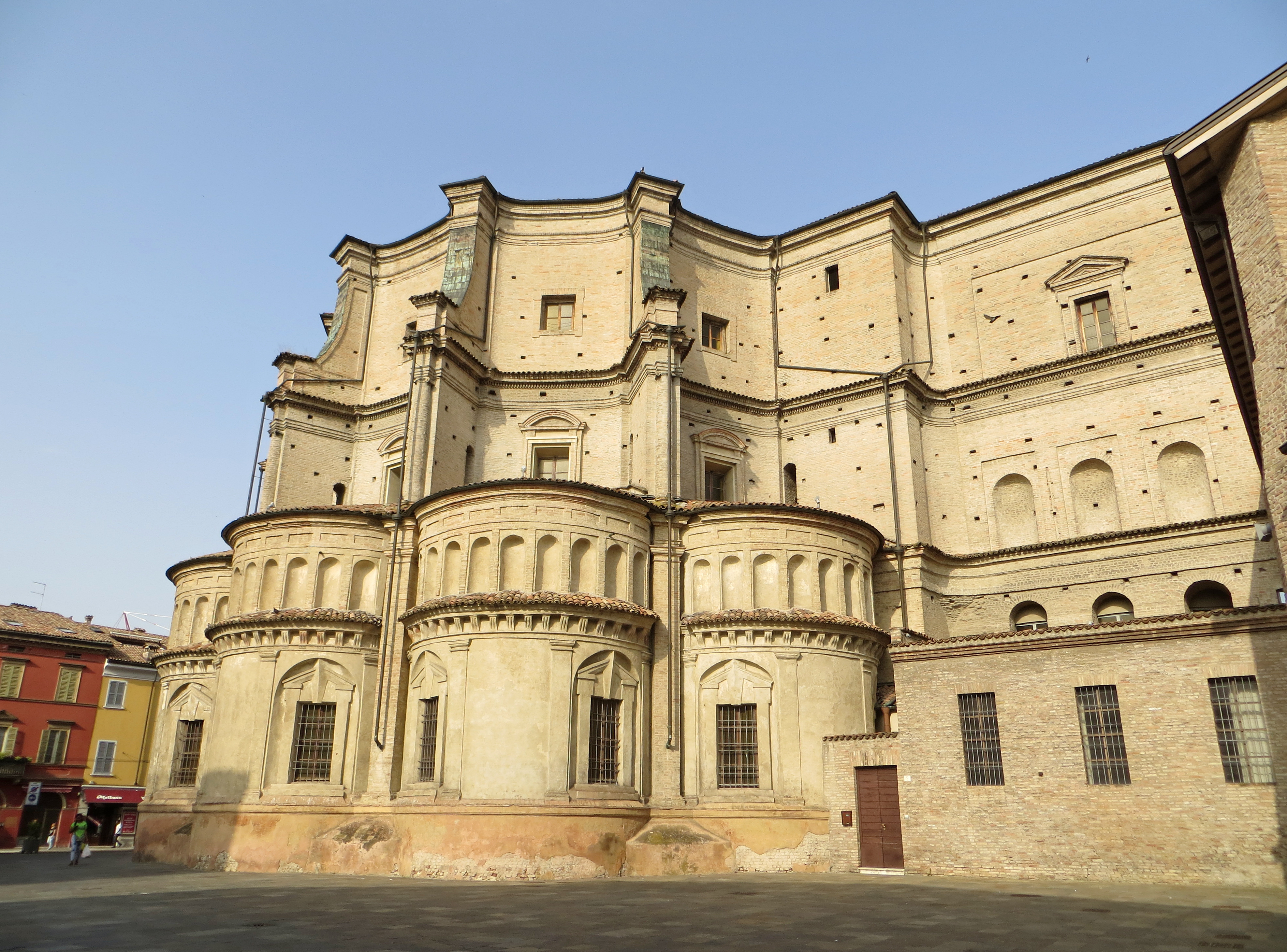 Chiesa della Santissima Annunziata (Parma) - absidi laterali